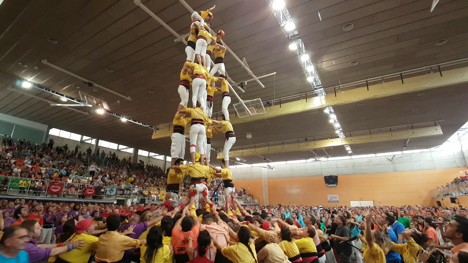 5d7 carregat al XXVI Concurs de Castells pels Castellers de Castelldefels